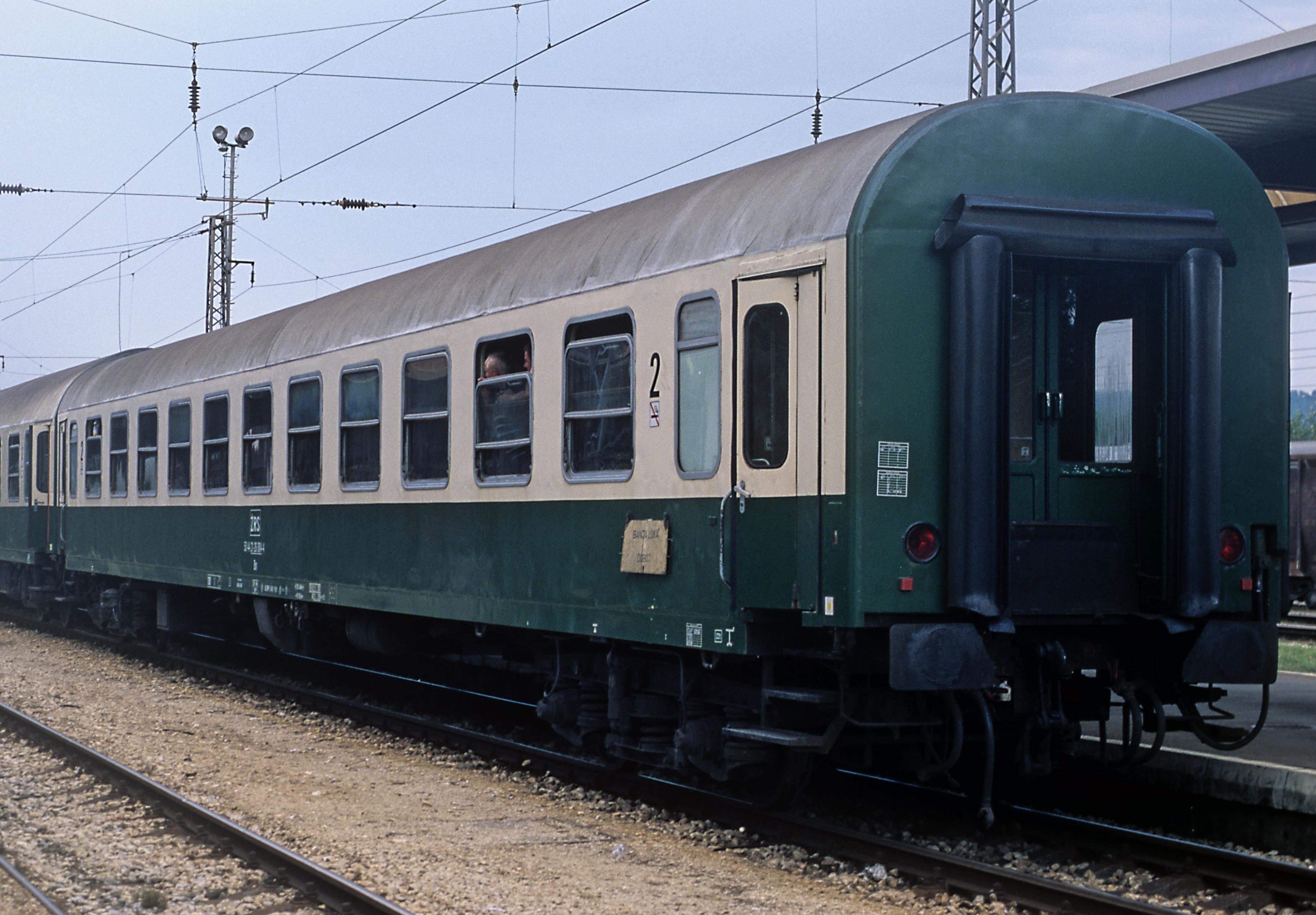 Abteilwagen 2. Klasse Typ Z2 vom Raw Halberstadt mit Drehgestellen Bauart Görlitz V modifiziert, Abteilseite. Die leichten Übergangstüren nach dem Vorbild der vierachsigen Rekowagen waren typisch für die Halberstädter Wagen mit Ausnahme der von vornherein für 200km/h zugelassenen IC-Wagen. Im Gegensatz zu den Rekowagen sind die Übergangstüren hier miteinander gekuppelt und schließen federbelastet selbsttätig. Als Aufbauhilfe nach den Jugoslawienkriegen nach Bosnien abgegeben und bei der Željeznice Republike Srpske eingestellt. Originallack chromoxidrün–elfenbein.